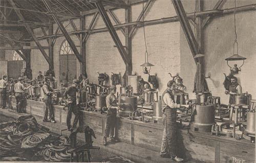 Atelier de tréfilerie dans L. WEILLER, Traité général des lignes et transmissions électriques, G. Masson, Paris, 1892. (Coll. A. Lange)